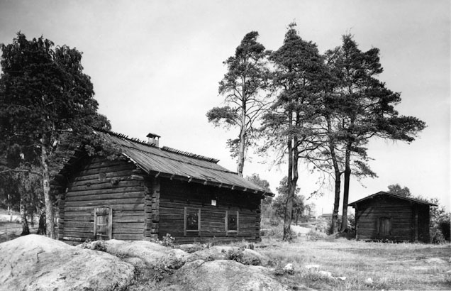 Savupirttimuseo ja aitta Tyysterniemessä.